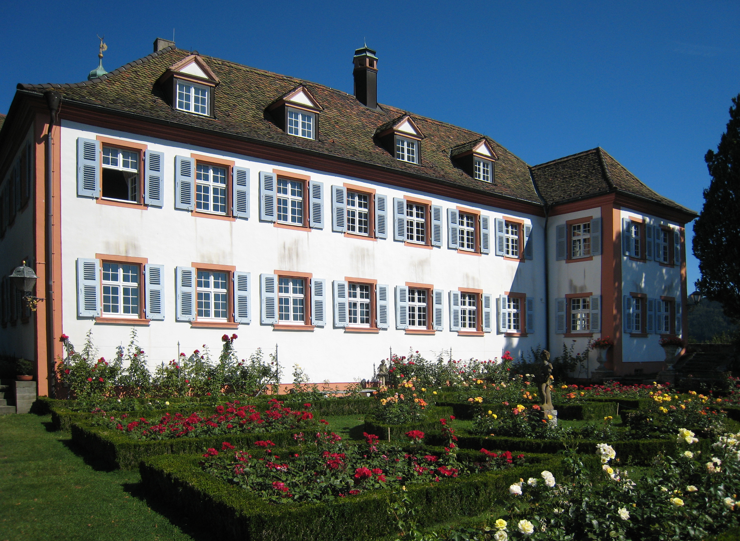 Schloss Bürgeln - Rosengarten auf der Südseite. Süd-Schwarzwald/Deutschland